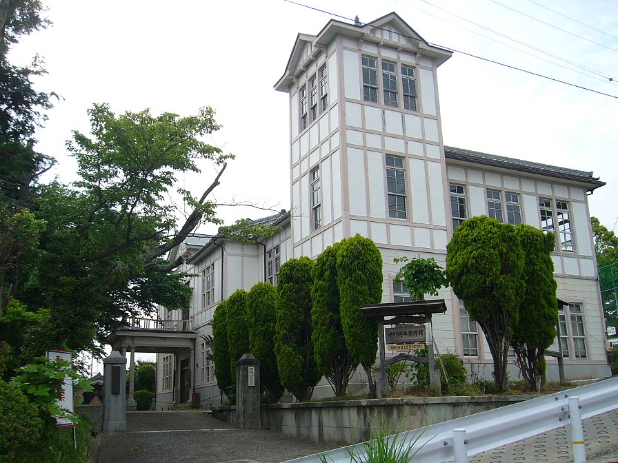 旧四郷村役場庁舎